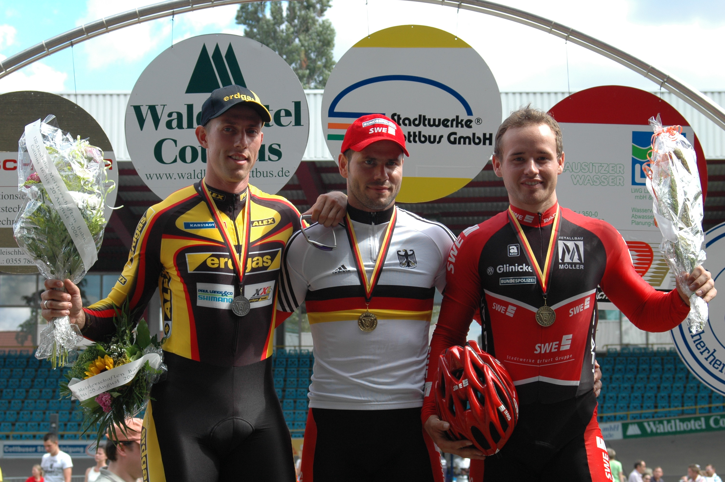 Podium Sprint (v.l.n.r.): Stefan Nimke, Matthias John, Michael Seidenbecher